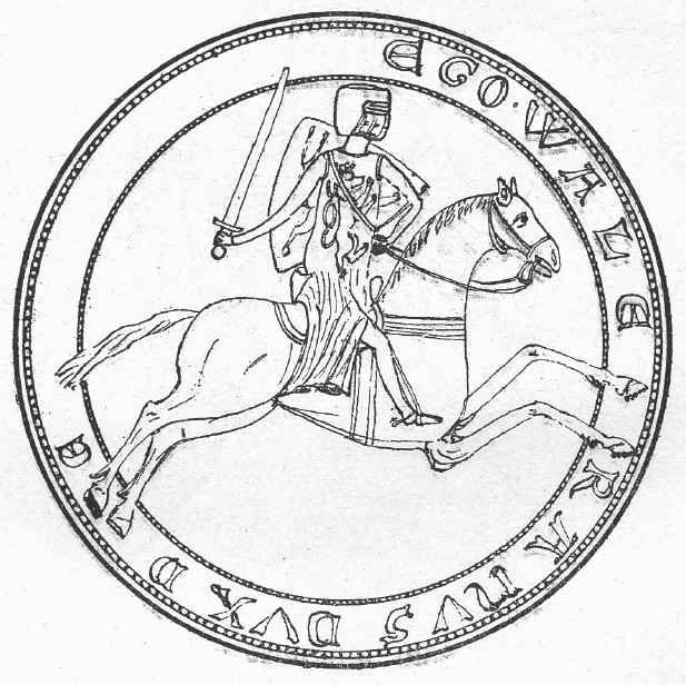 Walram V. (Limburg) - 1254